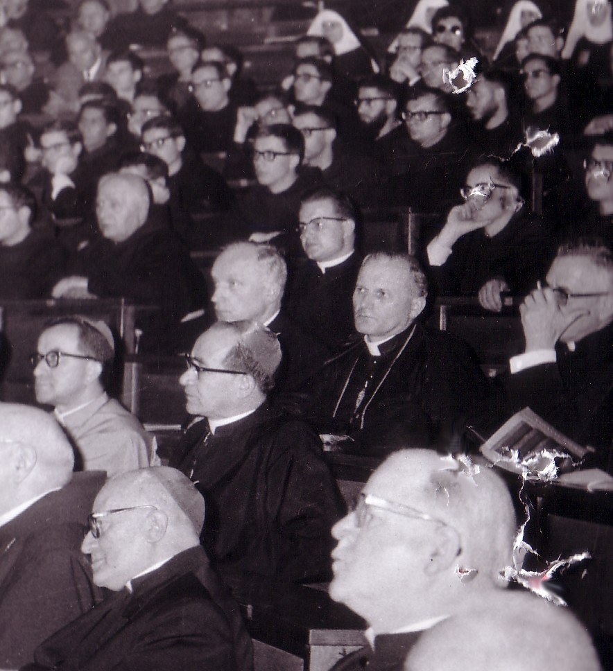 Wojtyla